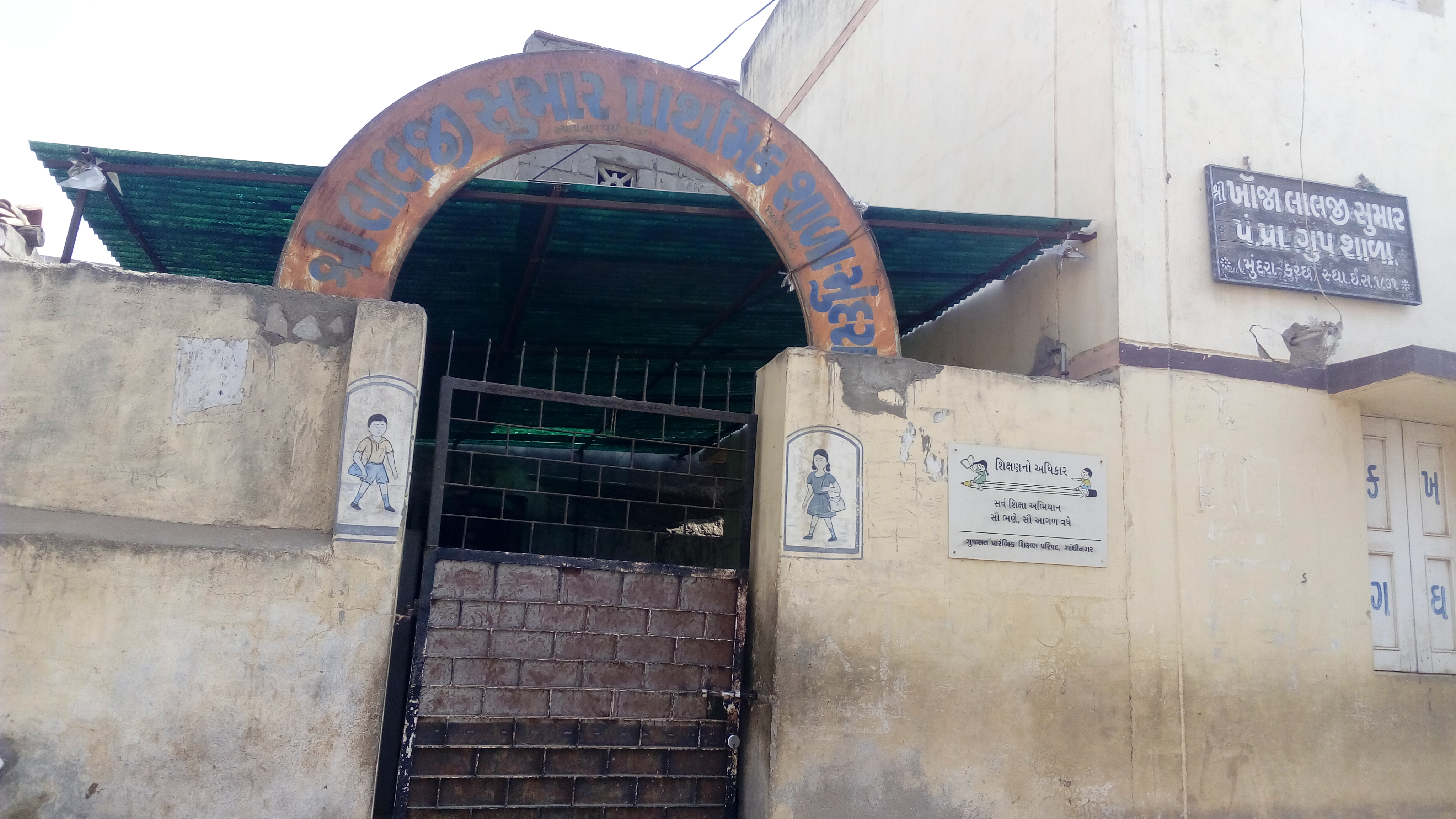 Khoja Lalji Sumar primary school at Mundra, Kutch, Gujarat, India